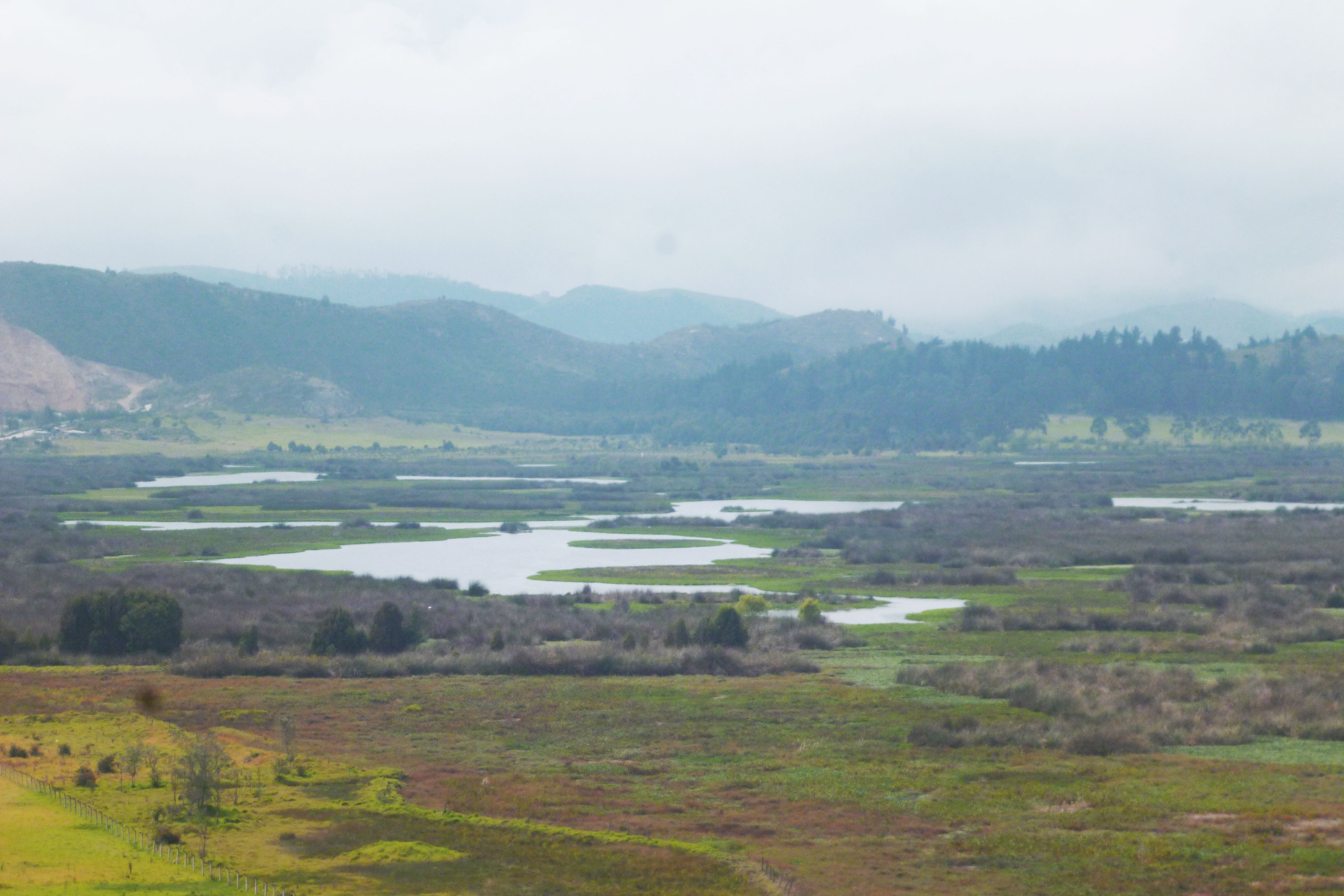 vista de la laguna la herrera en el municipio de mosquera desde los cerros de usca